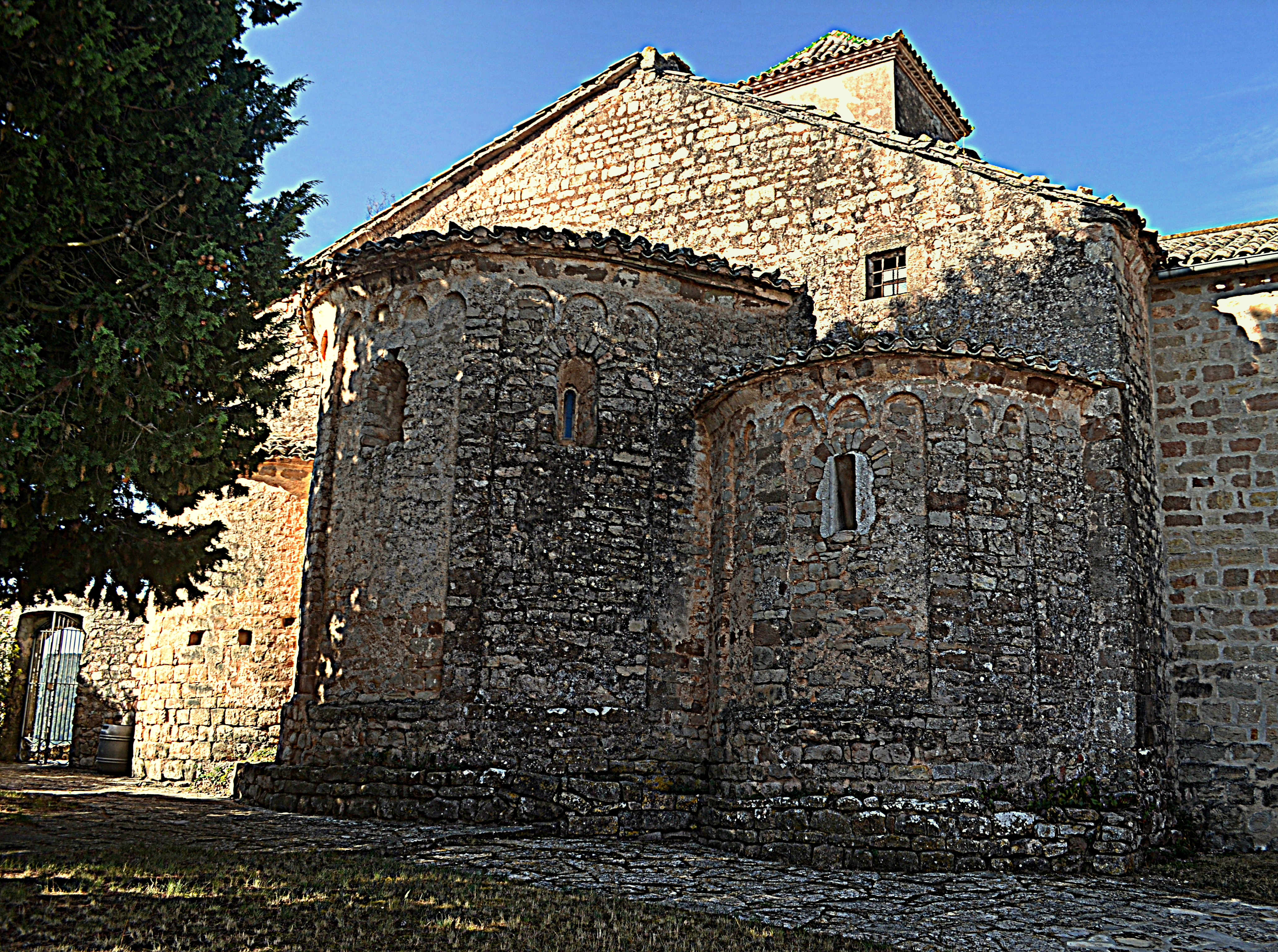 Església de Sant Pere de Castellfollit del Boix